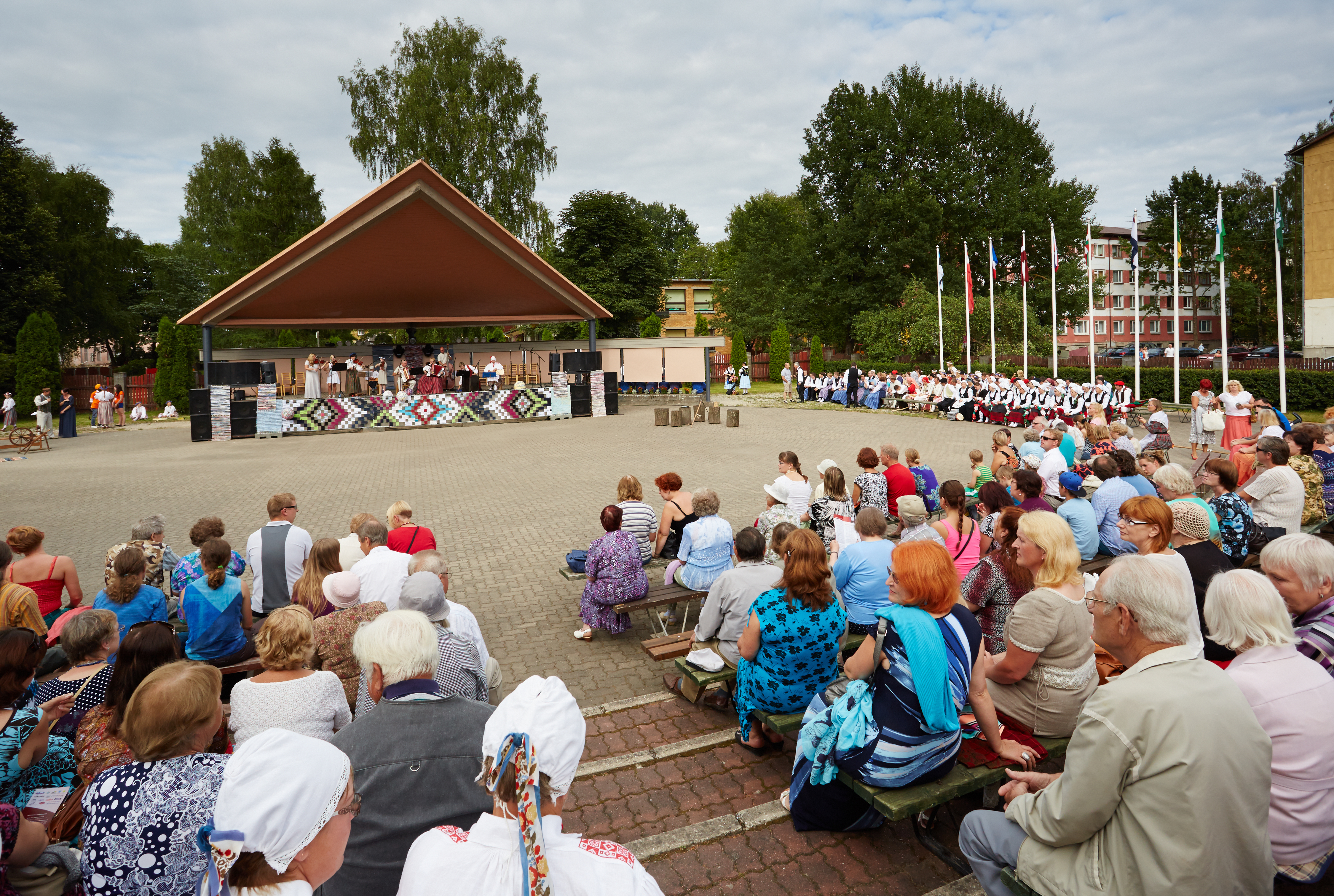 XX Võru Folkloorifestivali avakontsert Kandle aias 2014. aastal